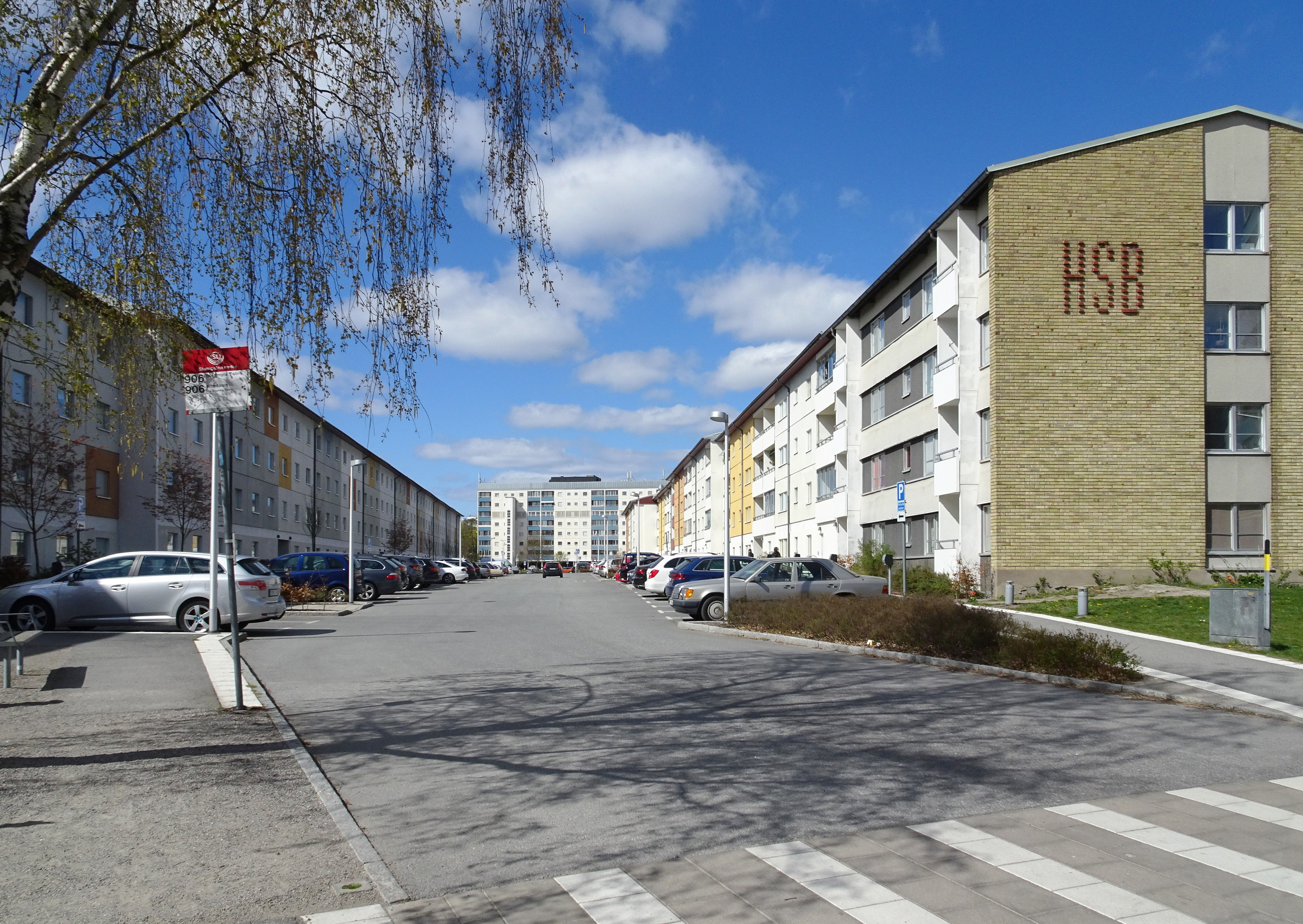 Kvarteret Stamtavlan, Stamgatan, Östberga, byggår 1950-tal, arkitekt Lars-Magnus Giertz för HSB